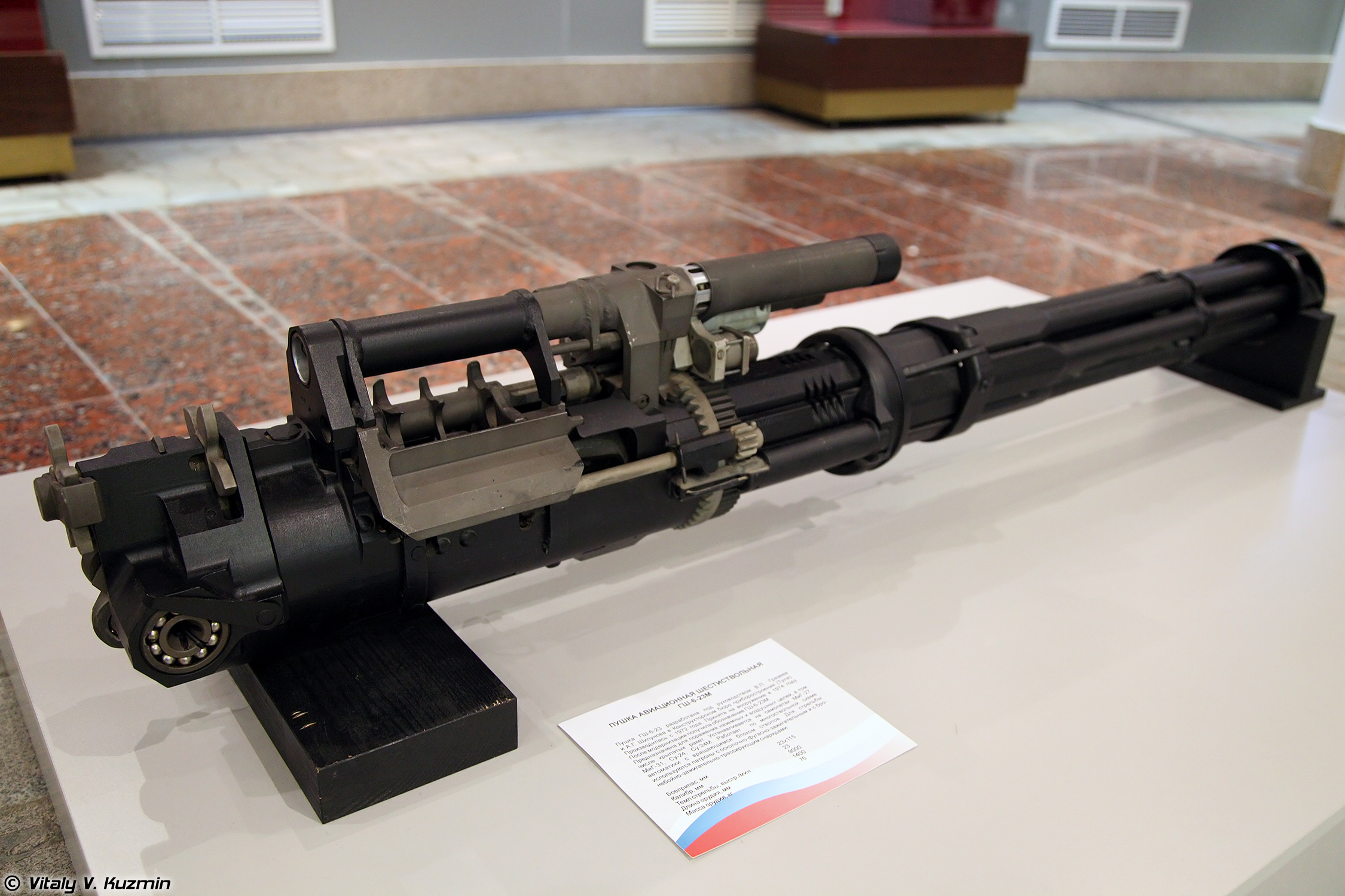 23-мм автоматическая пушка ГШ-6-23М